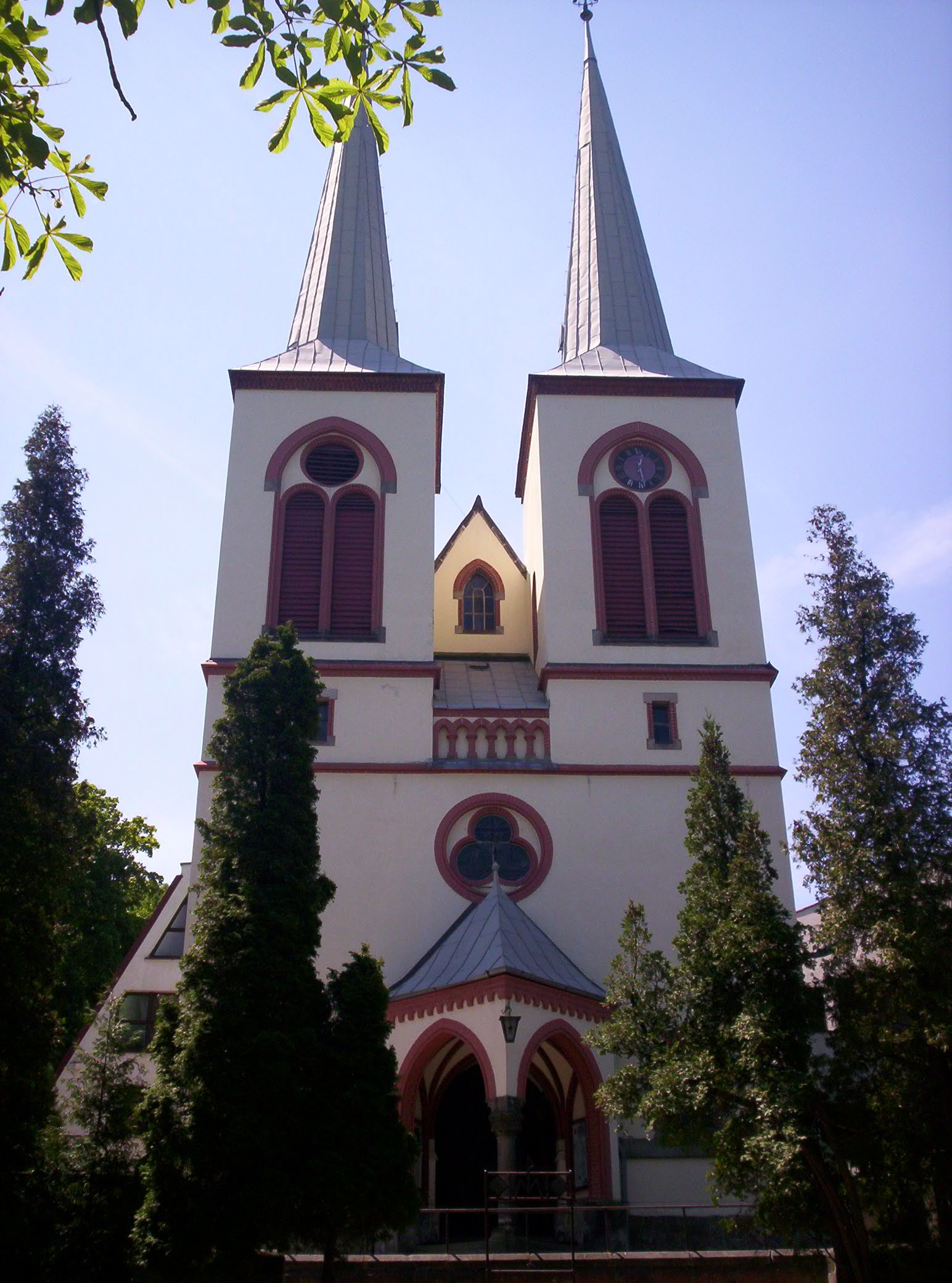 Kościół pod wezwaniem świętego Józefa w Świeradowie-Zdrój